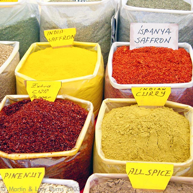 Spices